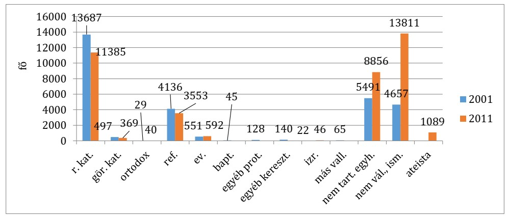 Dunakeszi lakosságának vallási megoszlása (2001-2011)